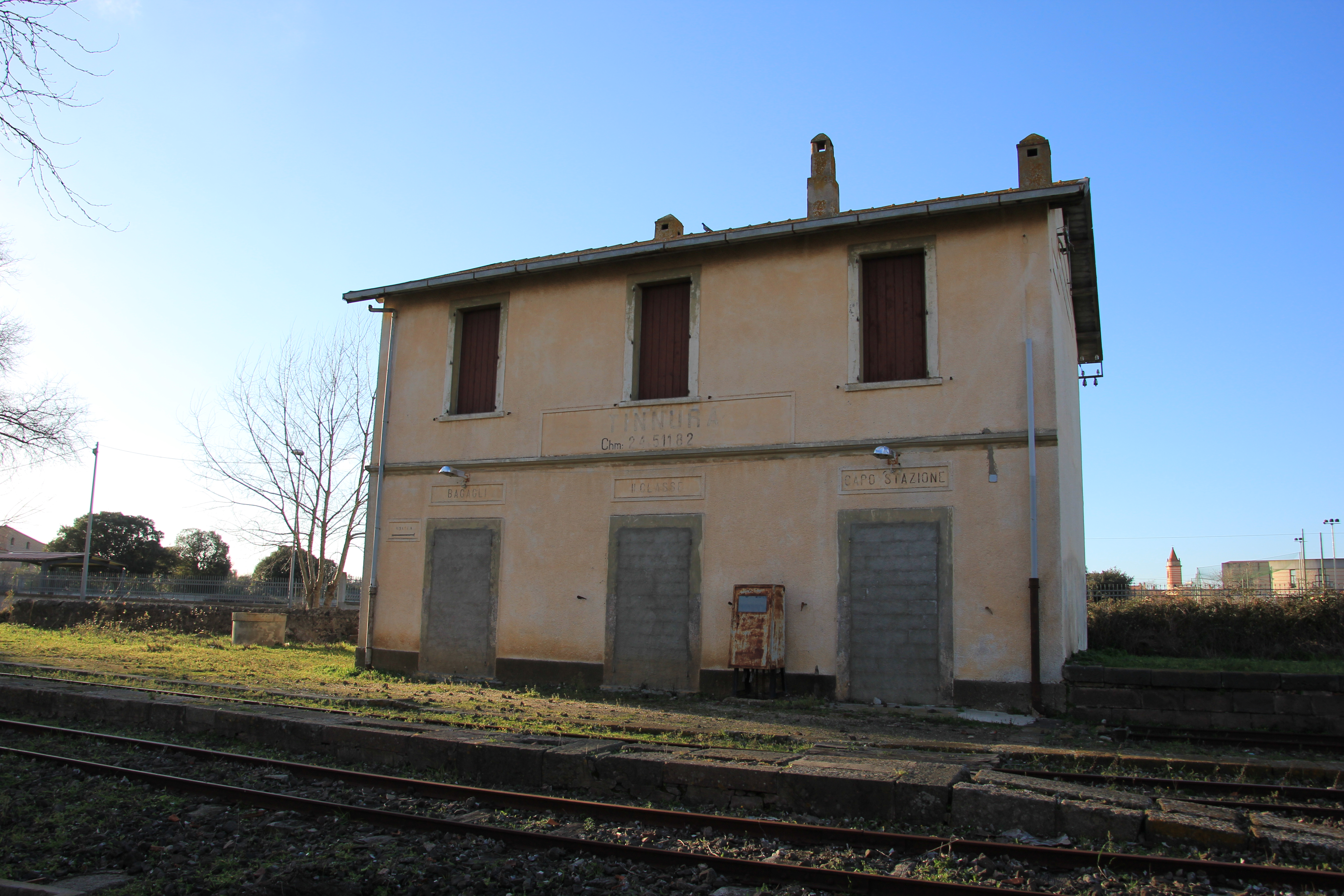 Tinnura, stazione ferroviaria